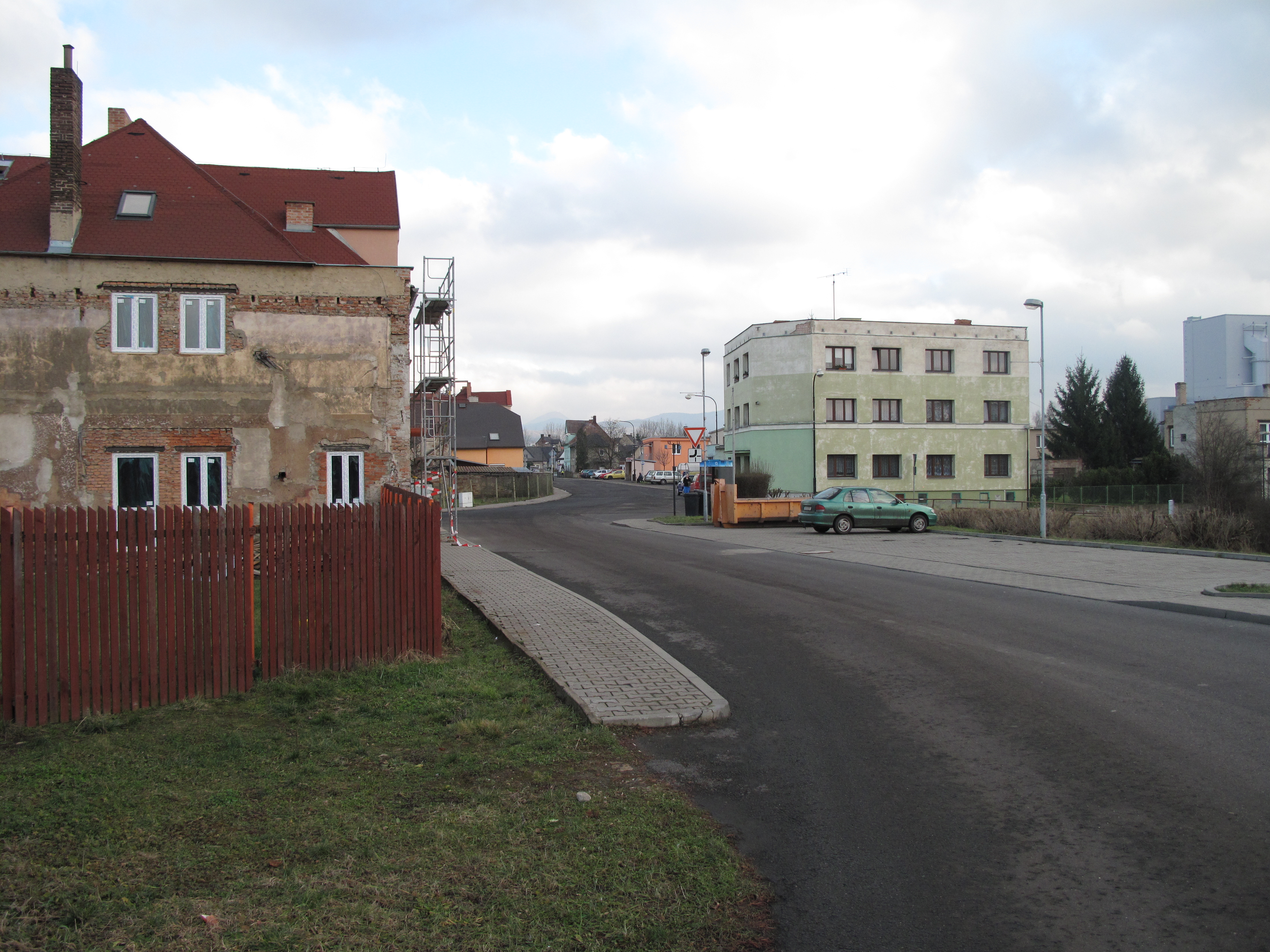 Ulice ve městě Ledvic. Okres Teplice, Česká republika.